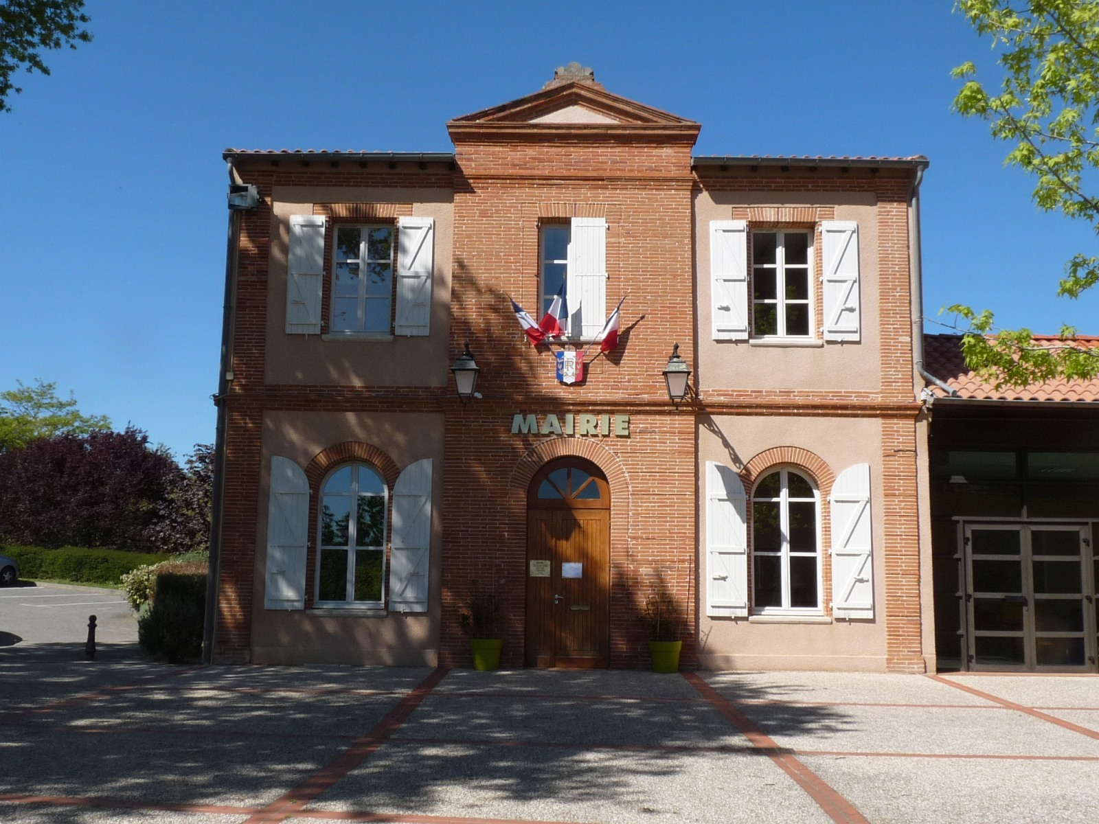 Mairie de Mons, Haute-Garonne, France